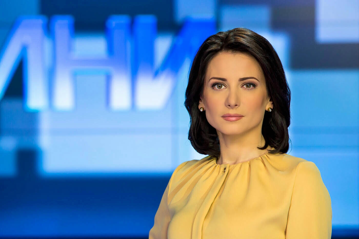 Ганна Гомонай